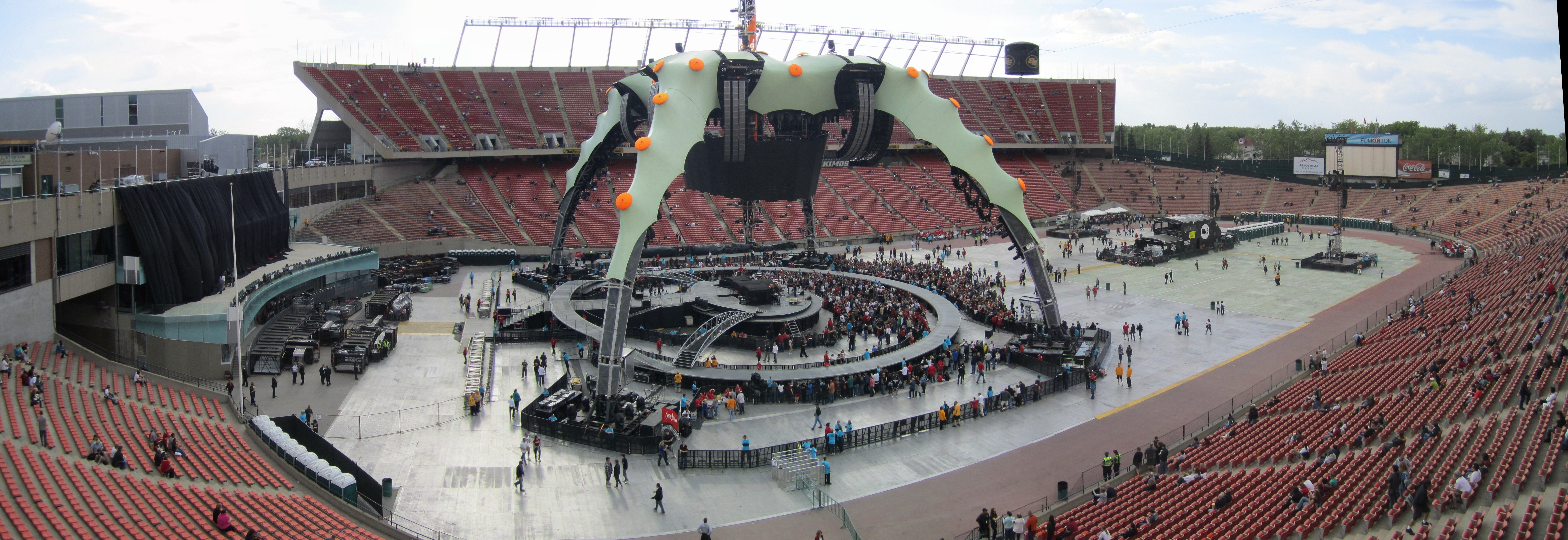 U2360 Edmonton